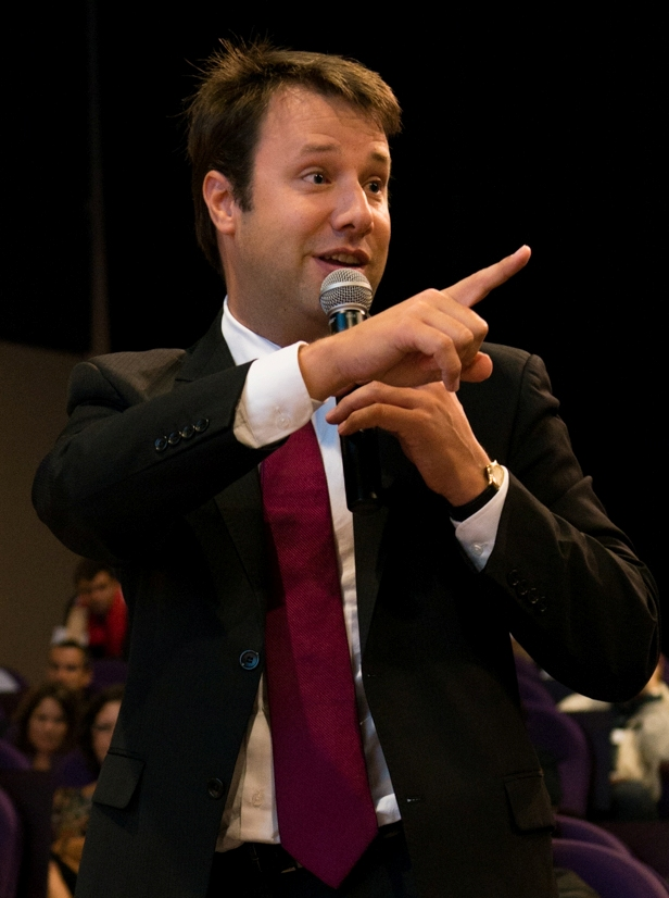 Intervention Loïg Chesnais-Girard octobre 2013 Paimpol (récadré)